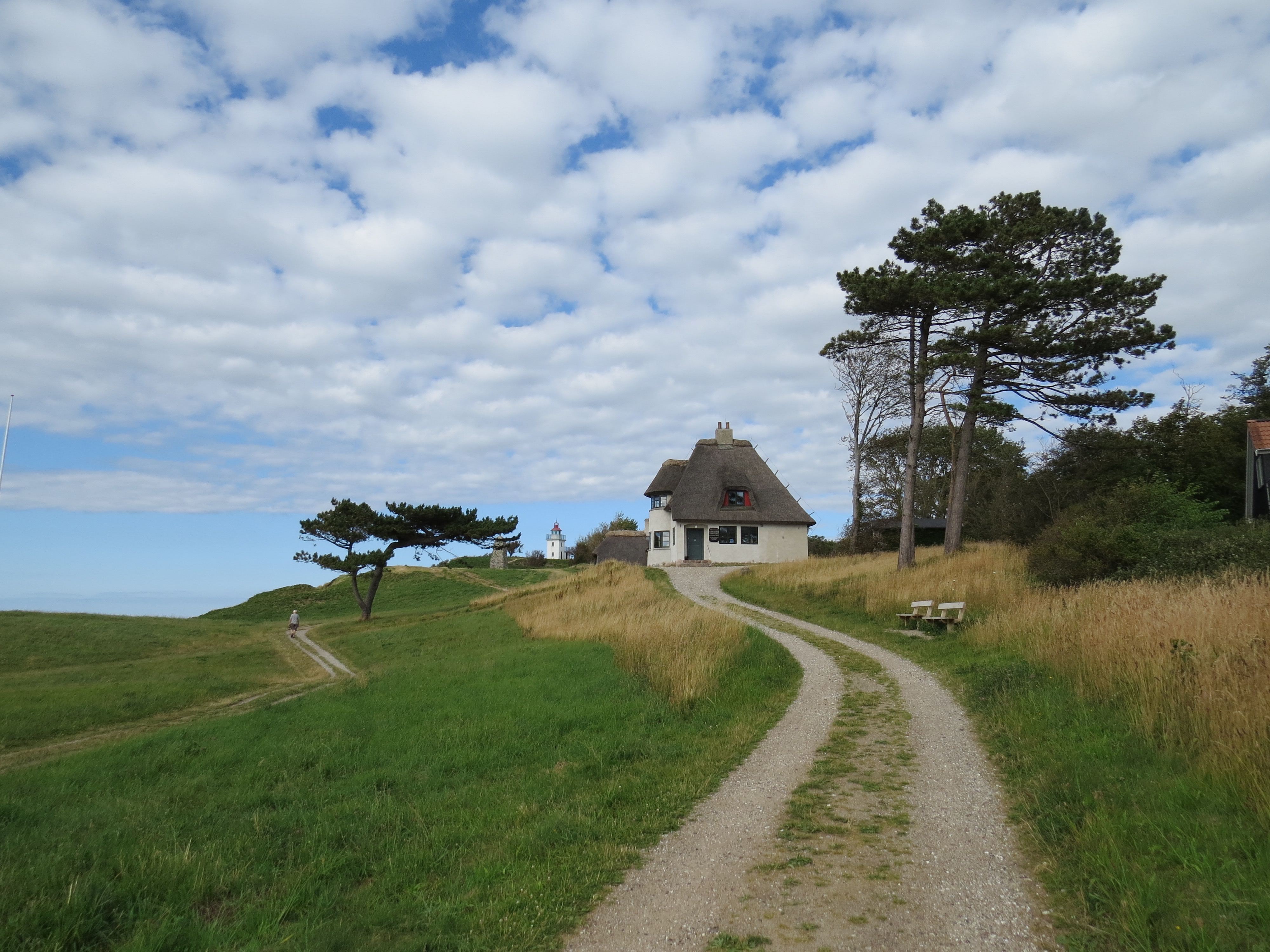 Knud Rasmussens hus, Hundested, Sjælland